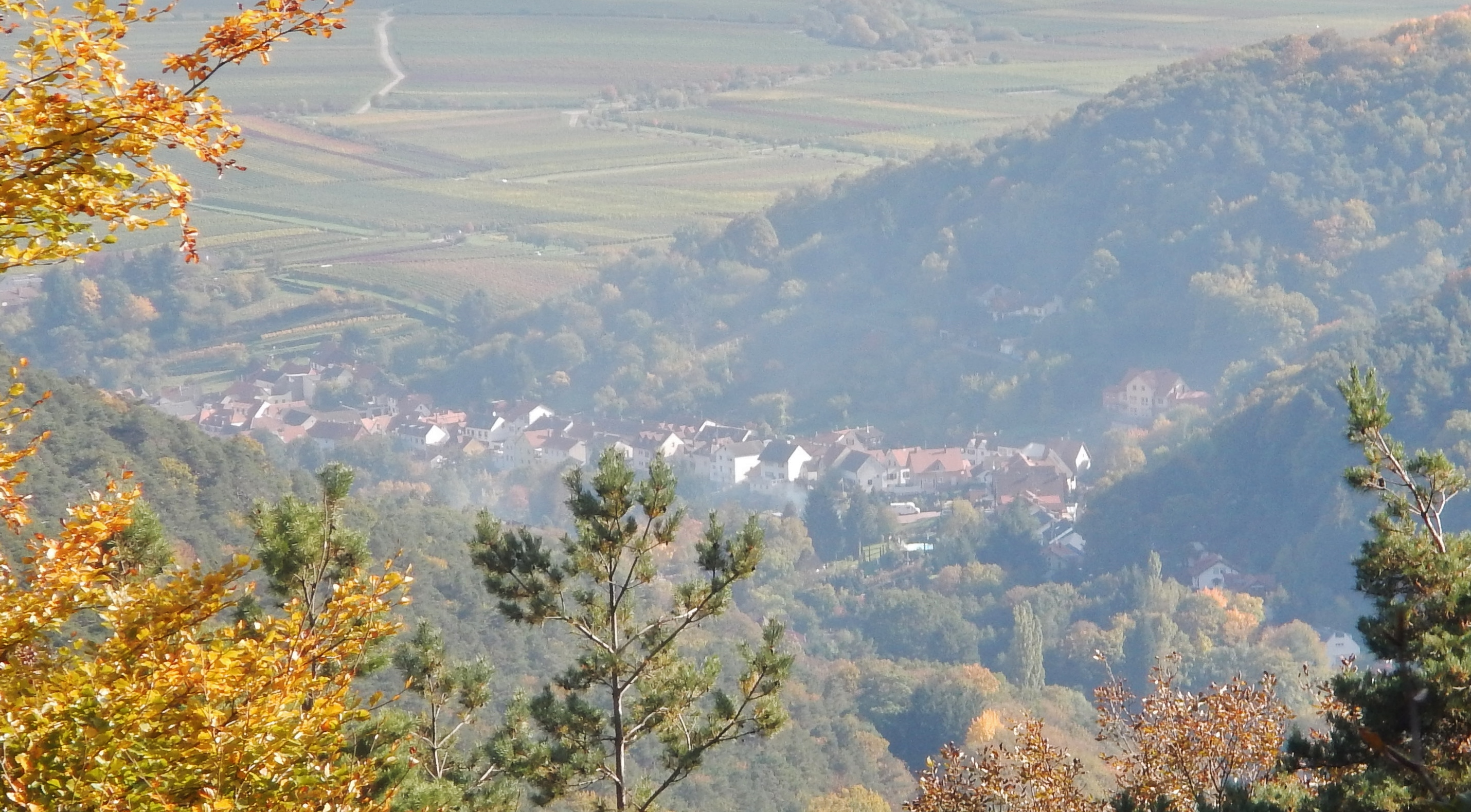 Ausblick von der Hüttenberghütte im Naturpark und Biosphärenreservat Pfälzerwald